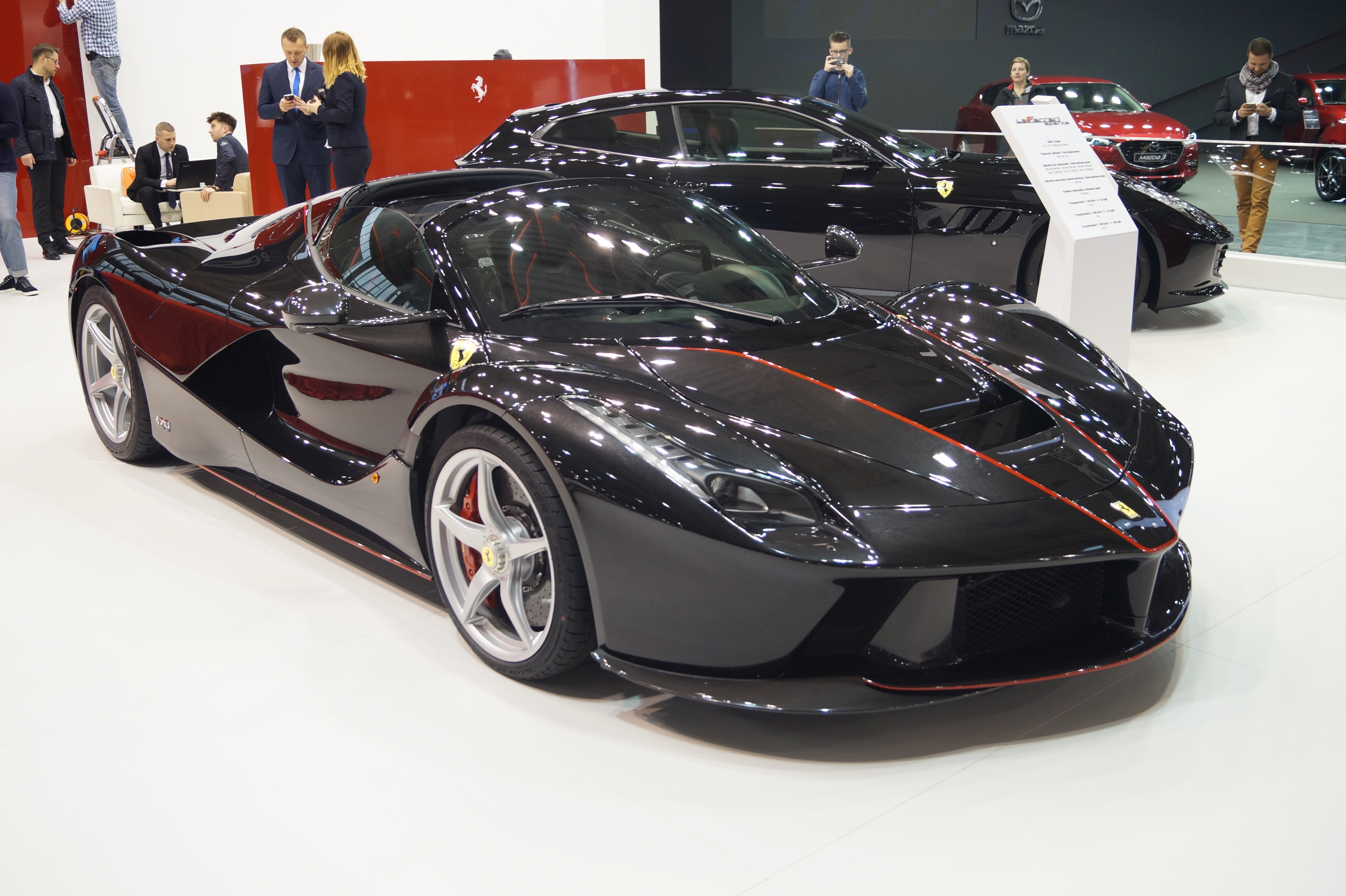 Ferrari LaFerrari Aperta na Motor Show Poznań 2017.